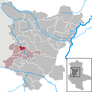 Wefensleben in Saxony-Anhalt (Country) - District (Landkreis) Börde